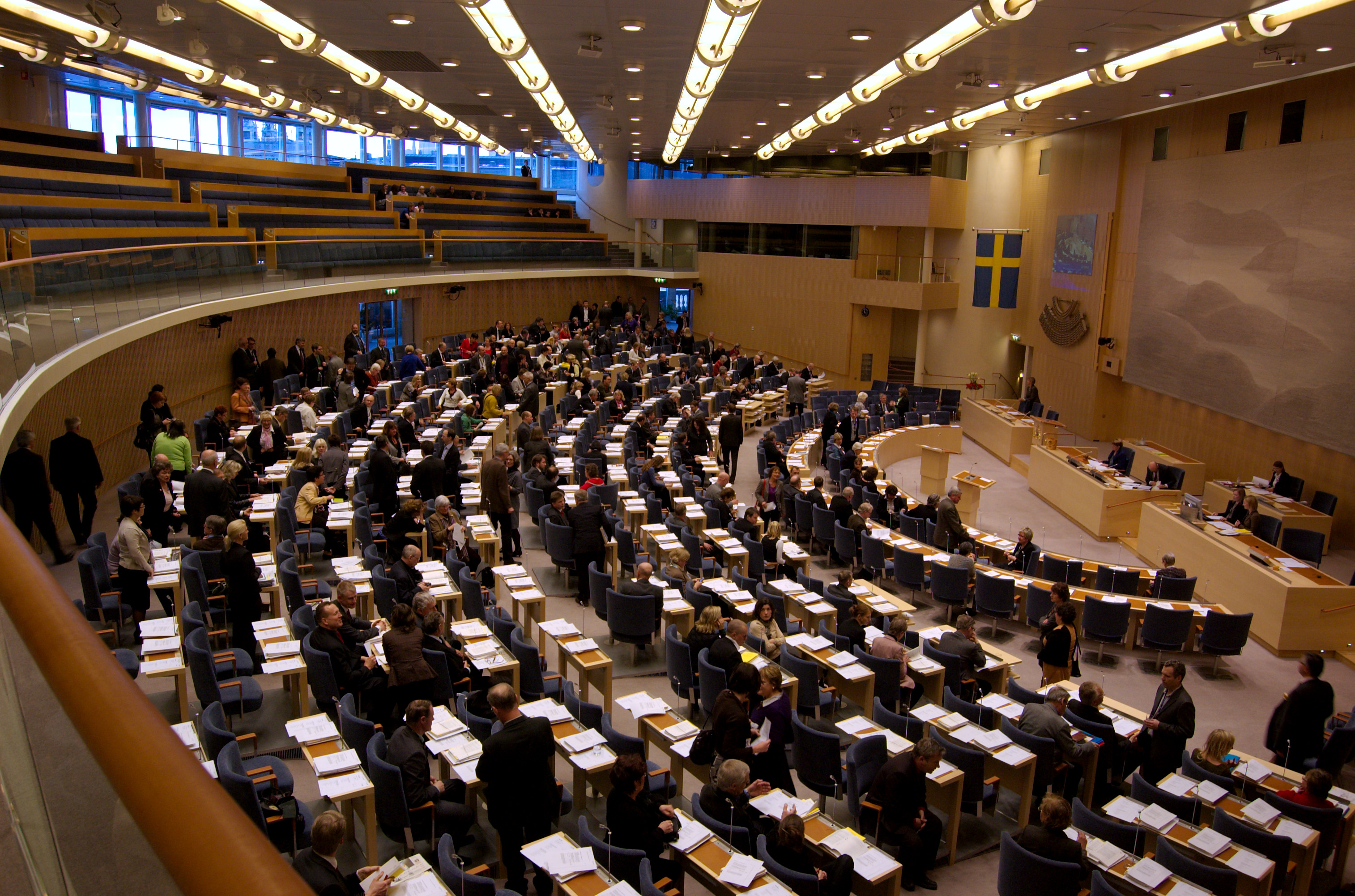 Plenisalen (the assembly hall), Sveriges riksdag.